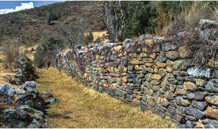 Fotografía de sector de las kanchas en el sitio arqueológico de Choquerecuay (Pueblo Viejo) en el distrito de Recuay en Áncash, Perú.